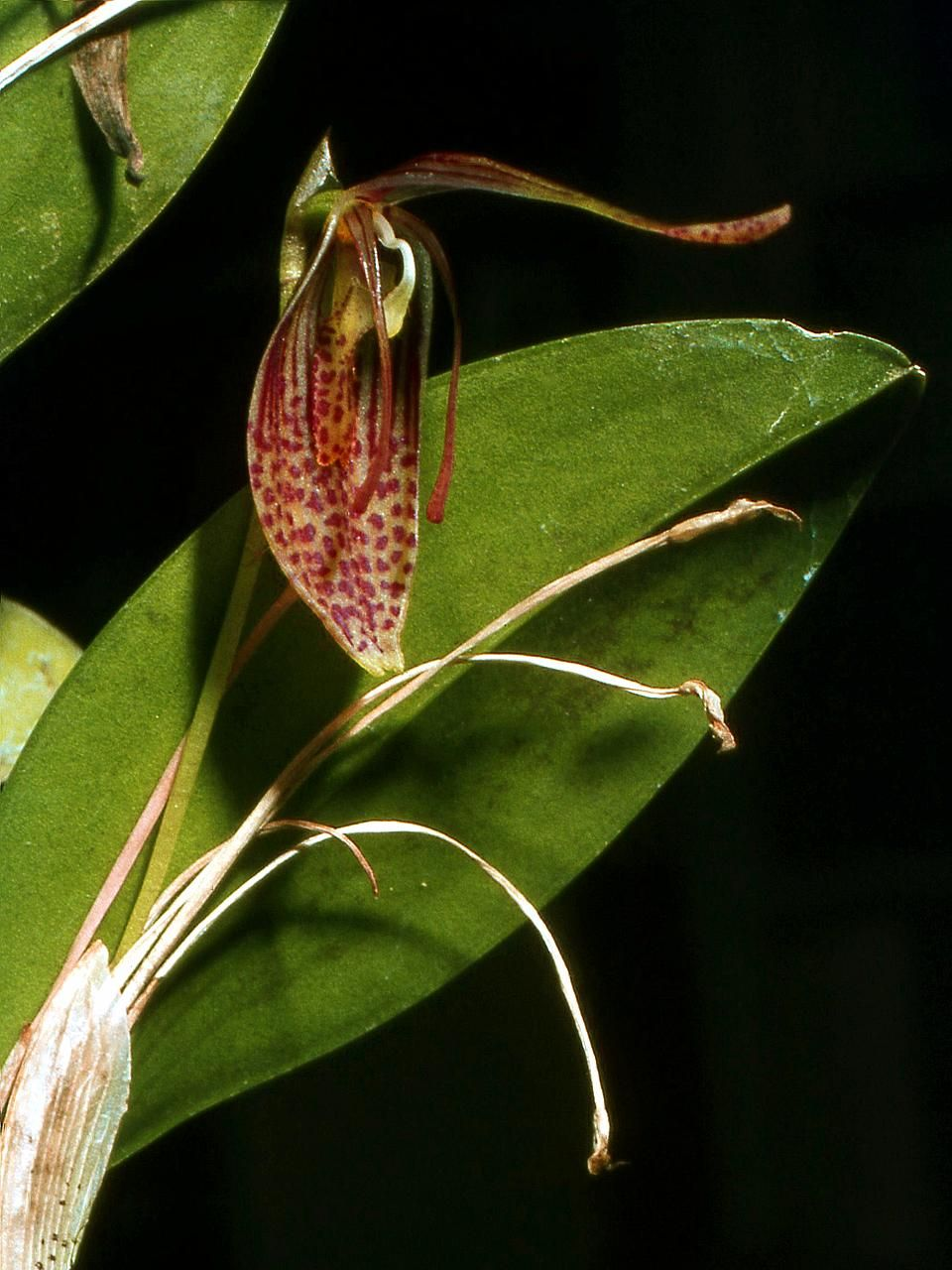 Restrepia aristulifera - flower